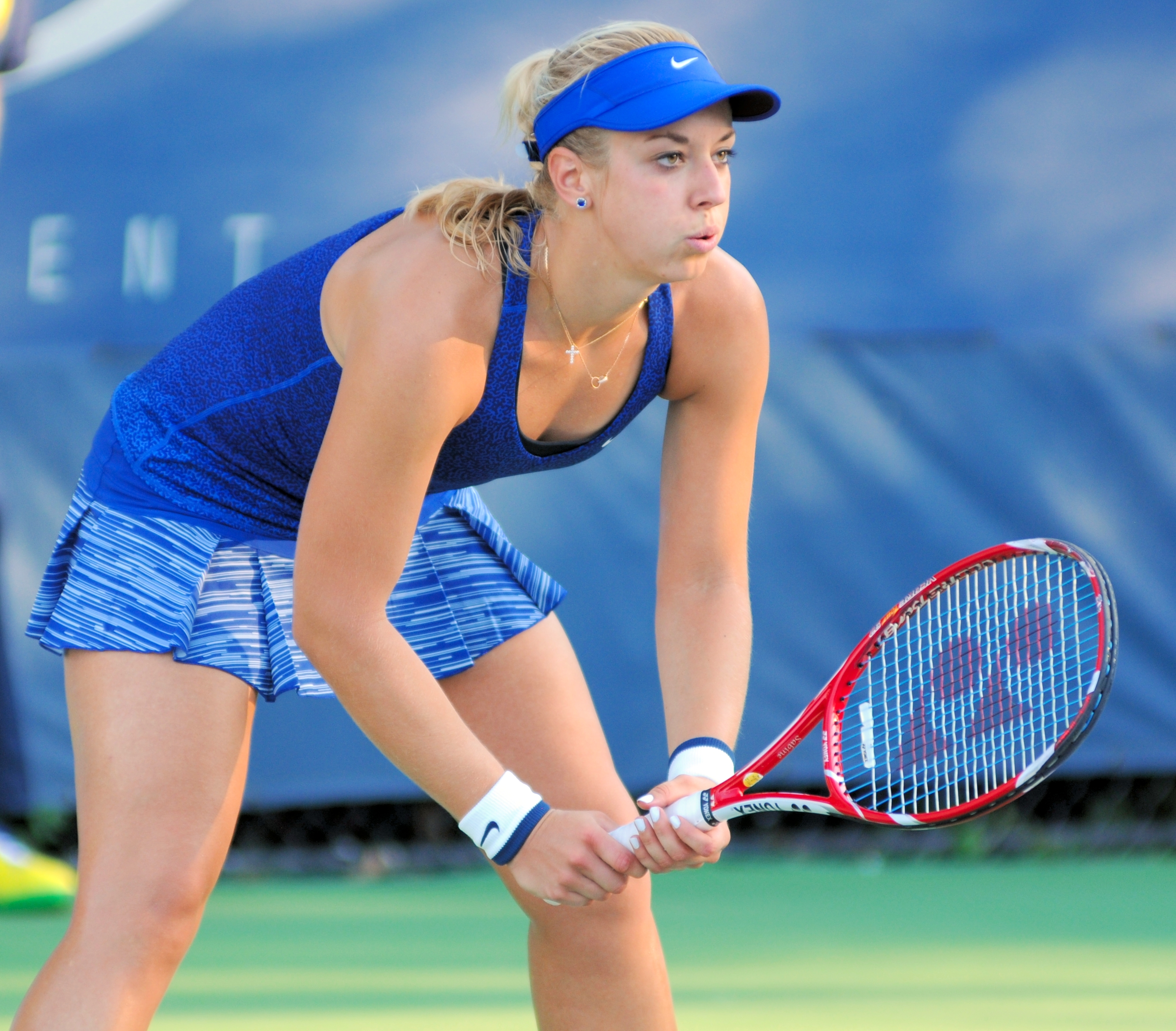 US Open 2014